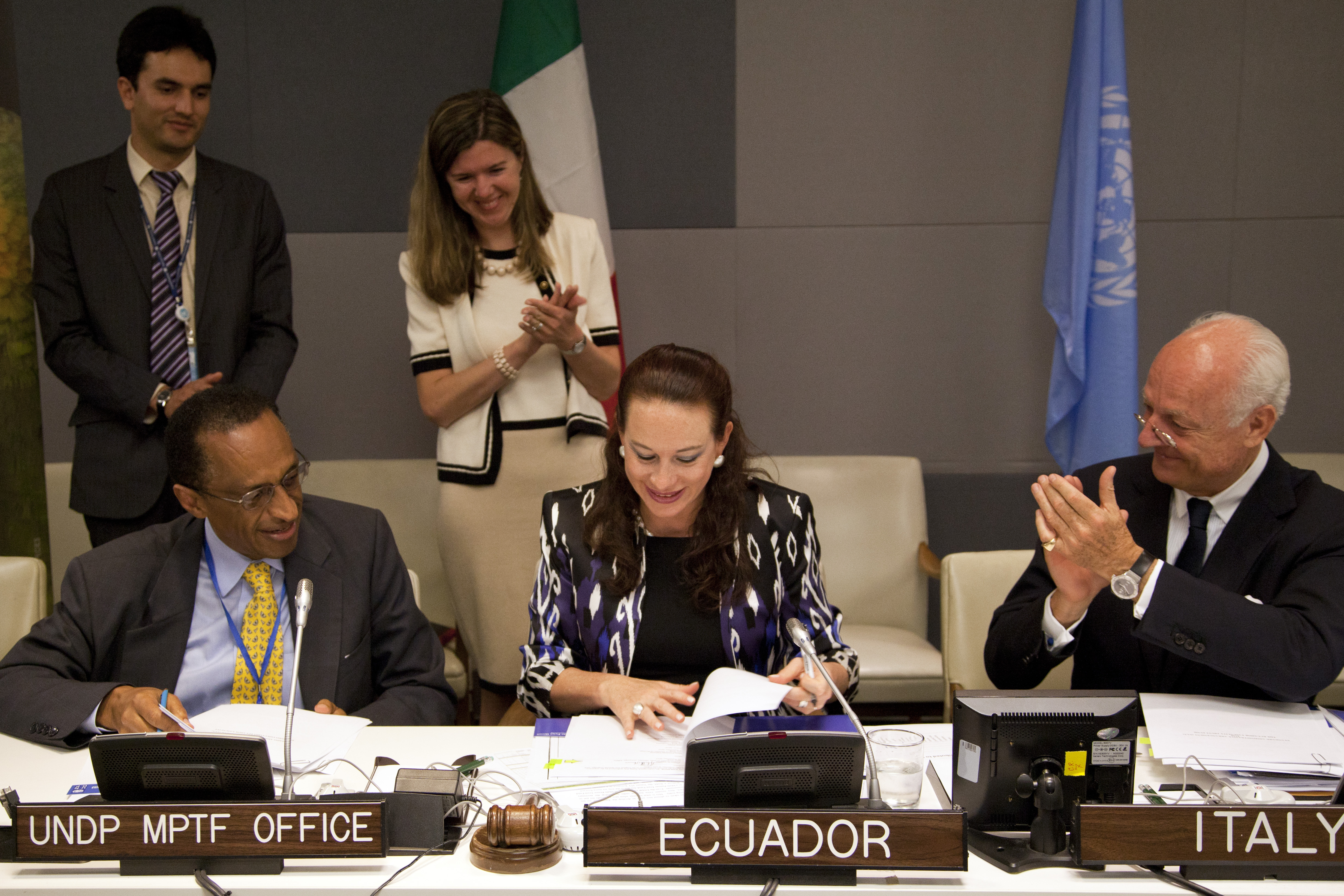 Nueva York (EEUU), 25 de septiembre 2012. El acuerdo fue suscrito por la Ministra Coordinadora de Patrimonio y Presidenta del Comité de Dirección Yasuní, María Fernanda Espinosa; el Viceministro de Estado de Italia, Staffan de Mistura; y el Coordinador Ejecutivo del Fondo Yasuní -ITT, Bisrat Aklilu, en el marco del 67° Período de Sesiones de la Asamblea General de Naciones Unidas. Foto: Fernanda LeMarie - Ministerio de Relaciones Exteriores, Comercio e Integración.